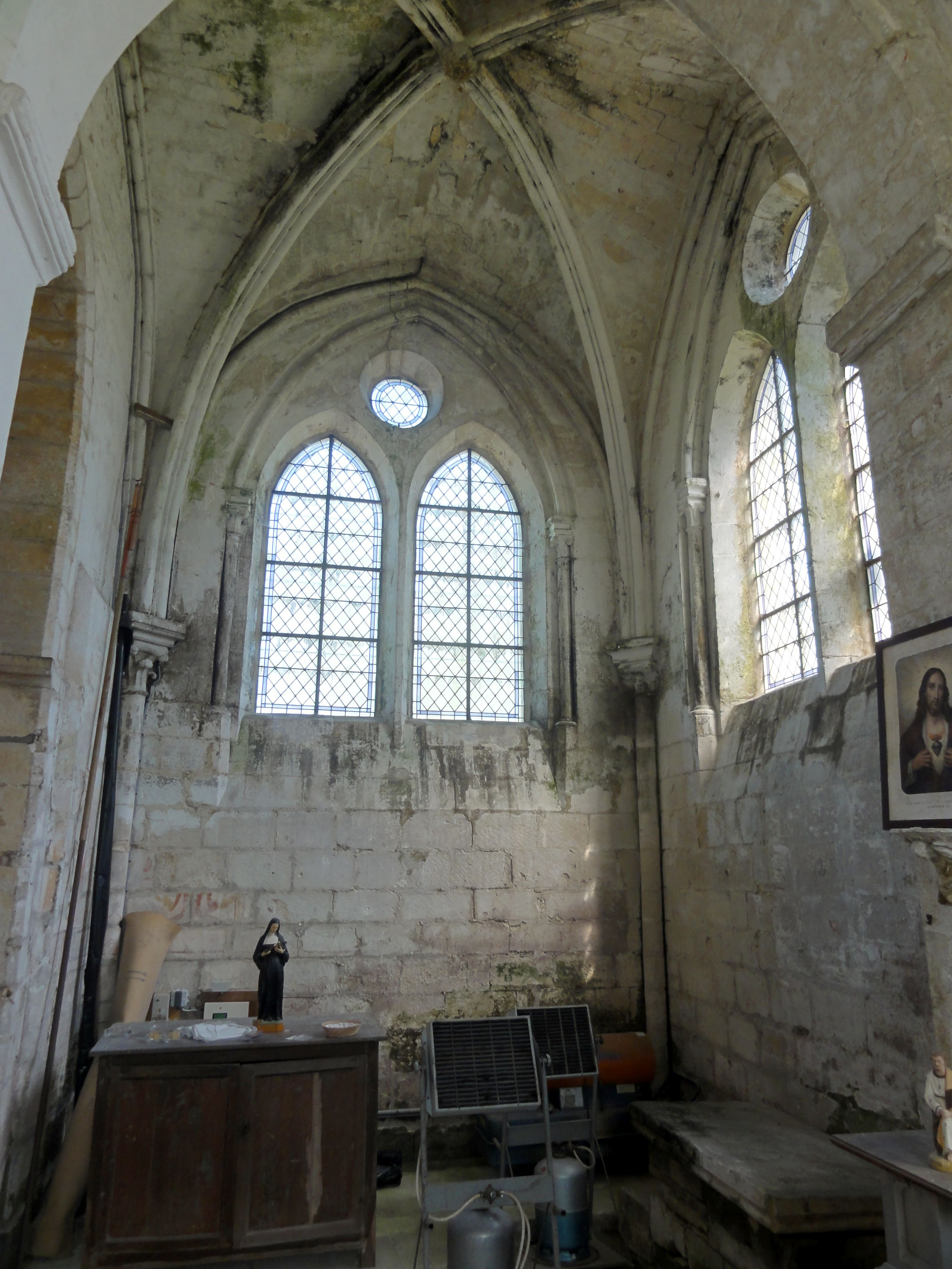 Chapelle nord-est, vue vers le nord.